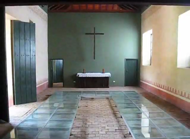 Casa de La Estrella (capilla)